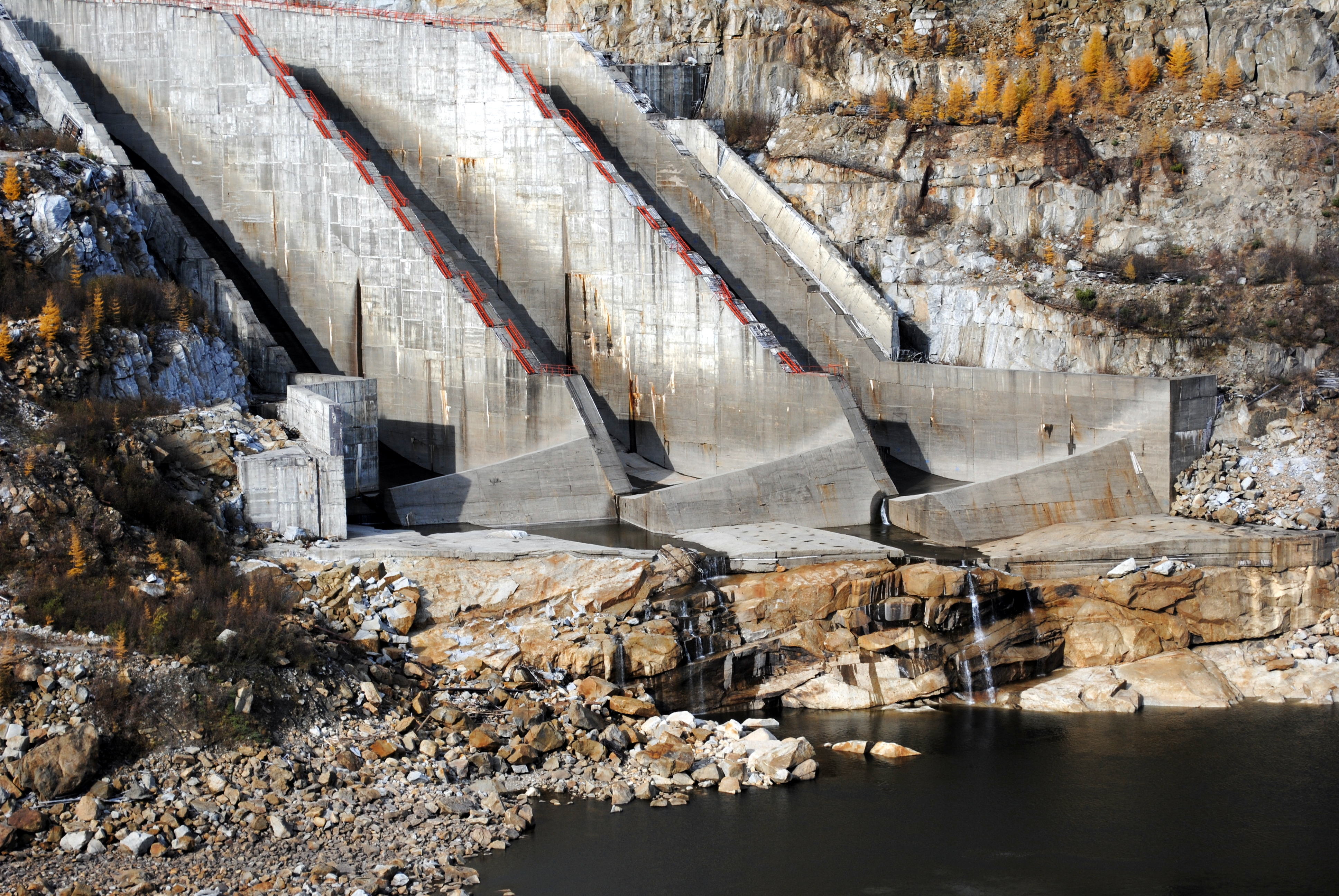 Водосброс Колымской ГЭС. Лотки быстротоков и трамплины